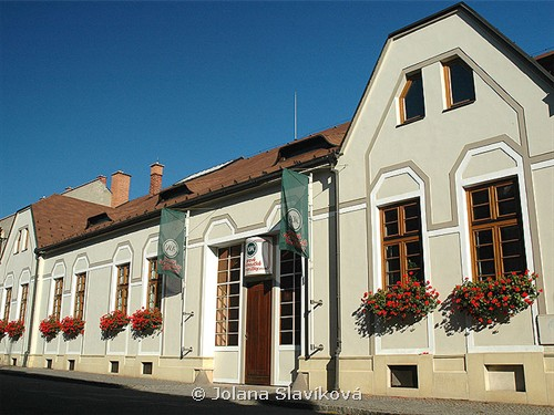 Olomoucké tvarůžků - firma A.W.